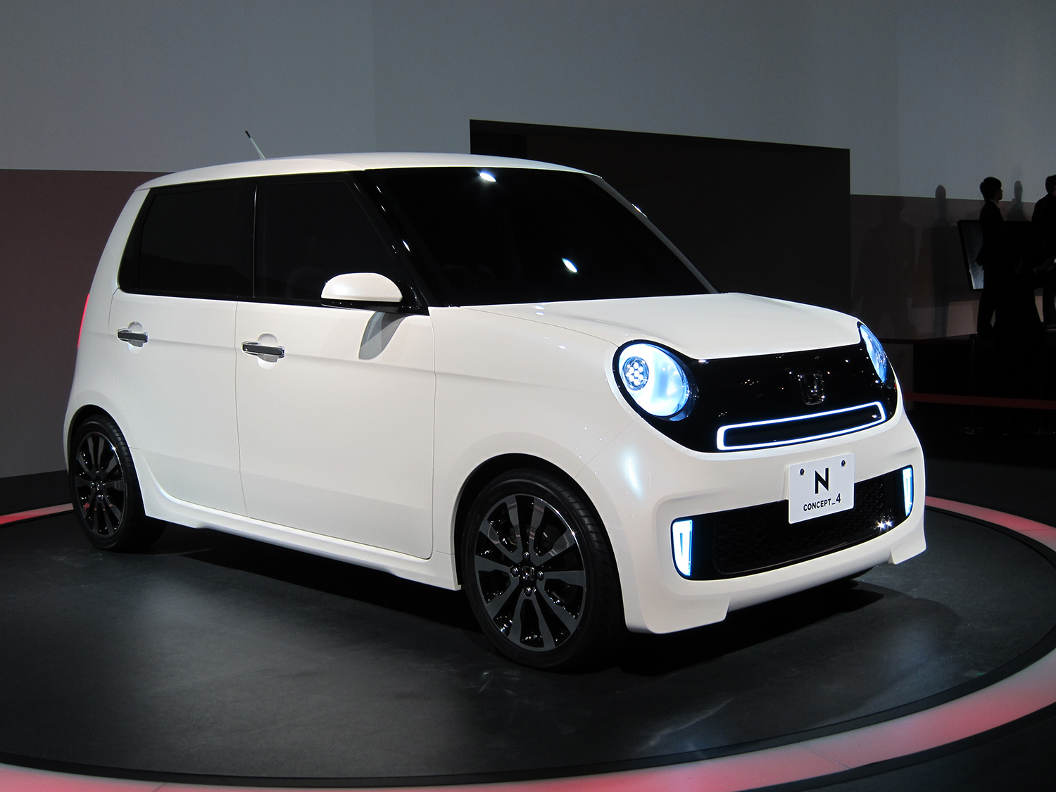 Photo pour article Honda N-One